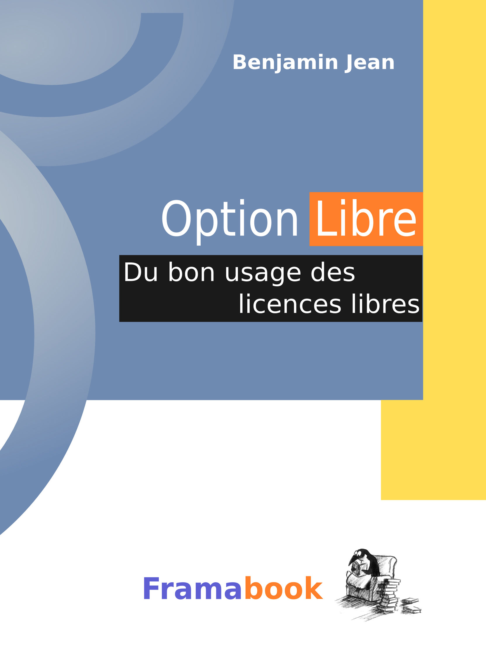 Essai Framabook, par Benjamin Jean, 2011.